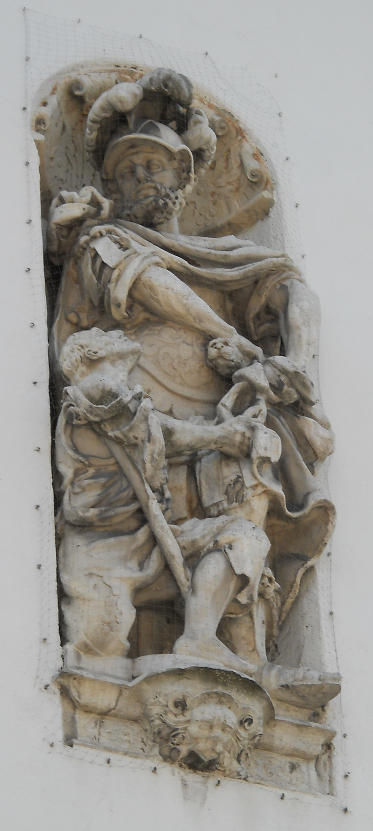 Figur des hl. Martin an der Fassade der Spitalkirche in Eichstätt (Oberbayern), geschaffen um 1700/1703 von dem Bildhauer Vitus Handschuher.